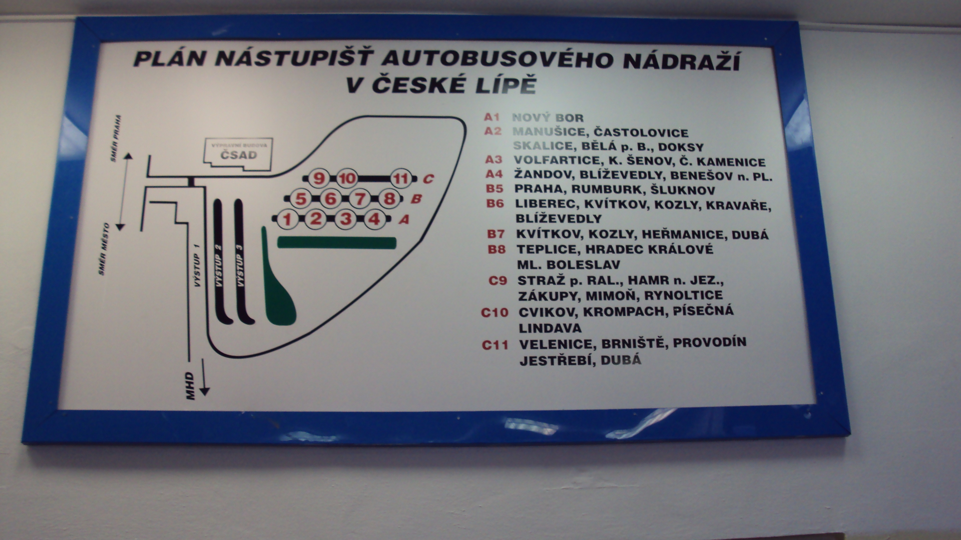 Orientační plán stanovišť autobusového nádraží Česká Lípa uvnitř budovy